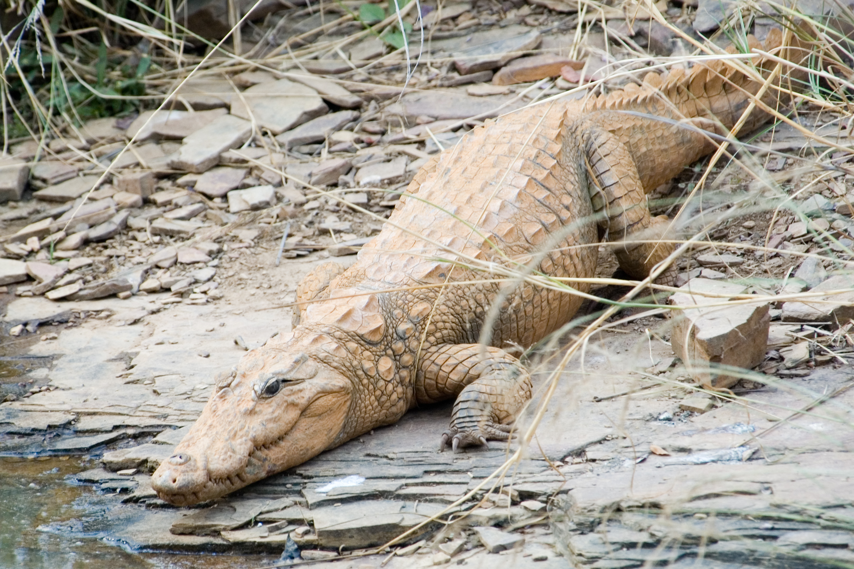 mugger crocodile Crocodylus palustris